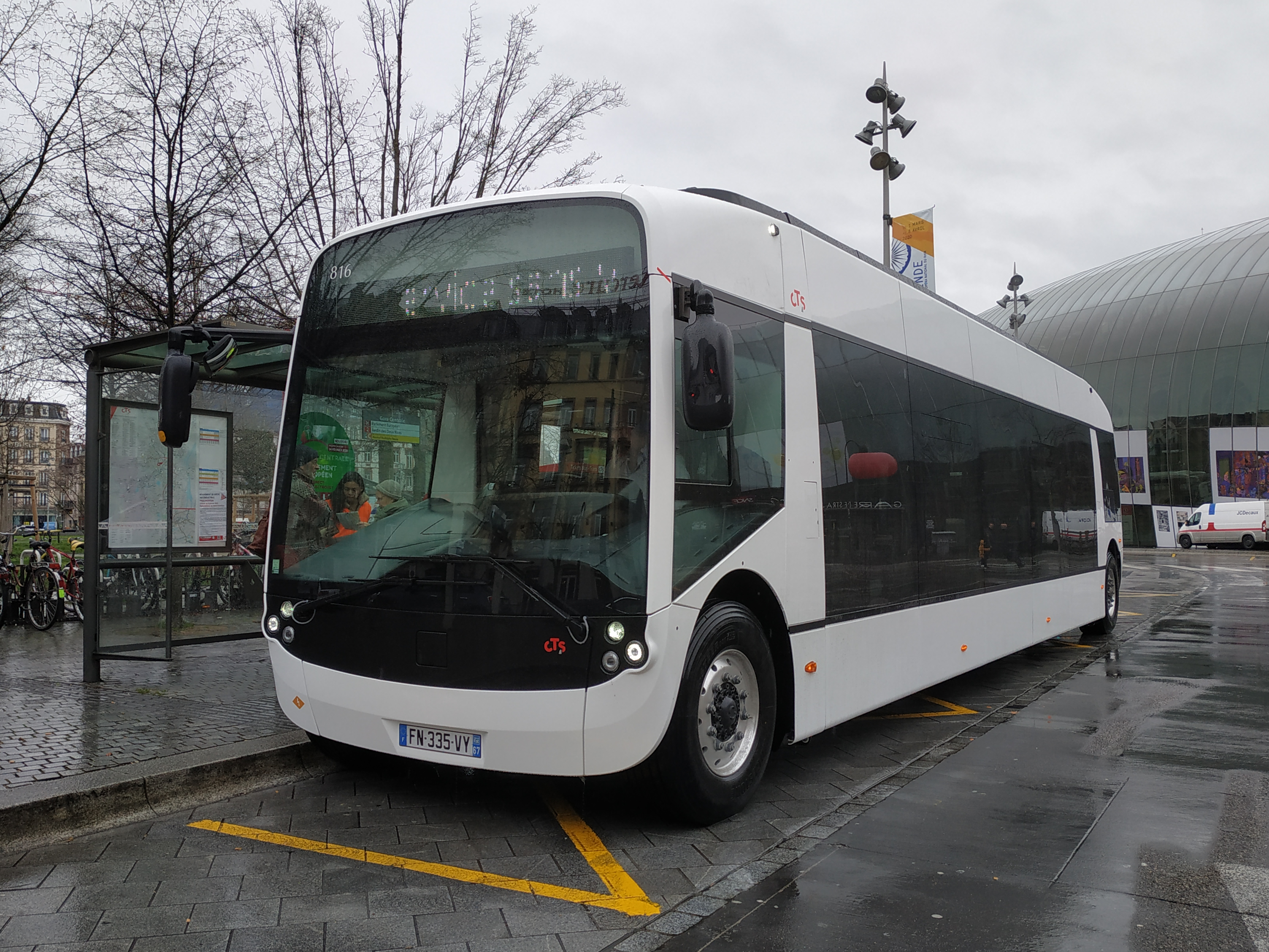 Alstom Aptis n°816 de la ligne H, ligne à haut niveau de service de Strasbourg inaugurée en février 2020. Celui ci ne porte pas encore la livrée dédiée de la ligne et circule en livrée blanche.